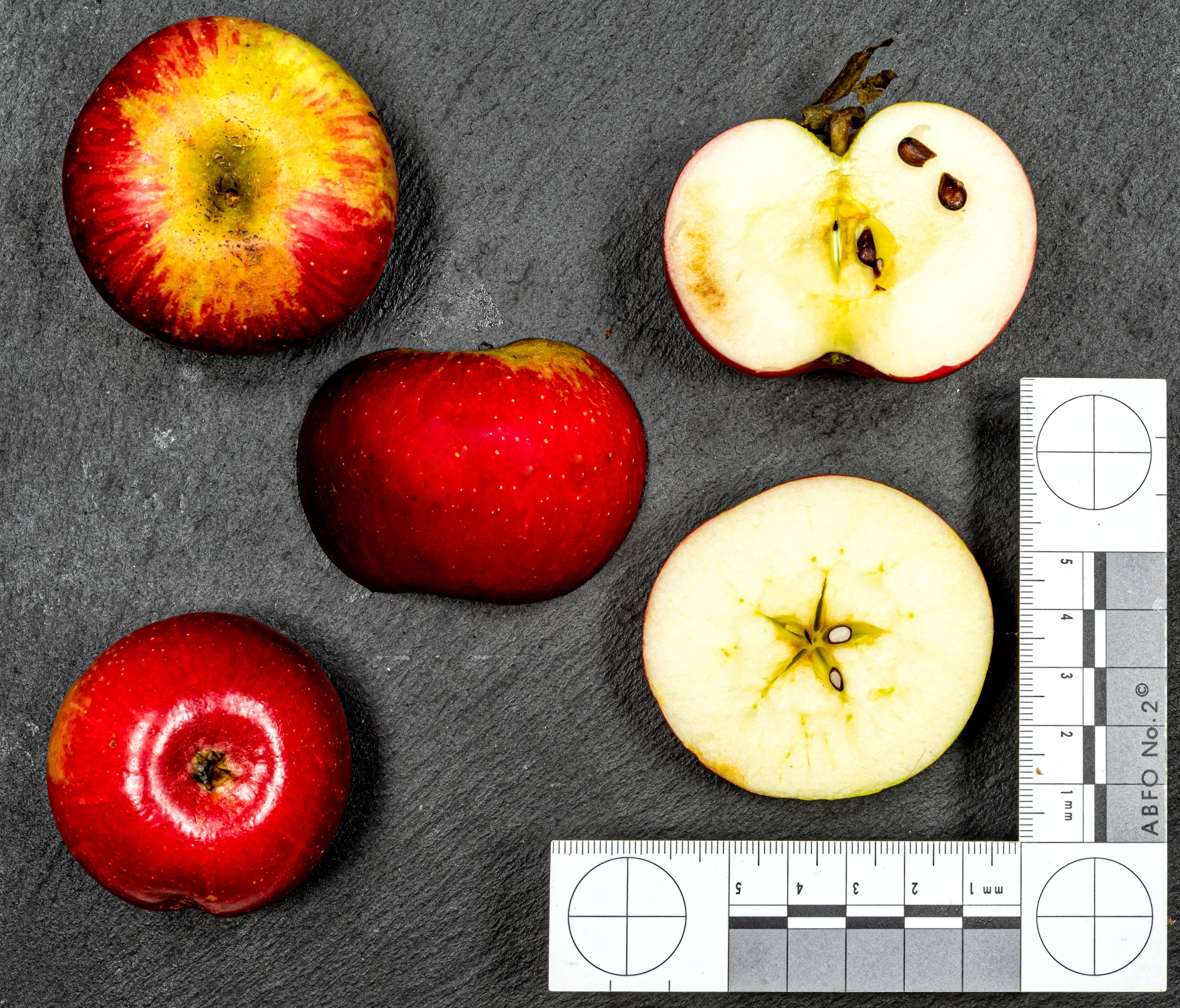 Apfelsorte: Discovery Discovery (oder: Thurston August) Worcester Parmäne × Schöner aus Bath 1949 in Essex, UK